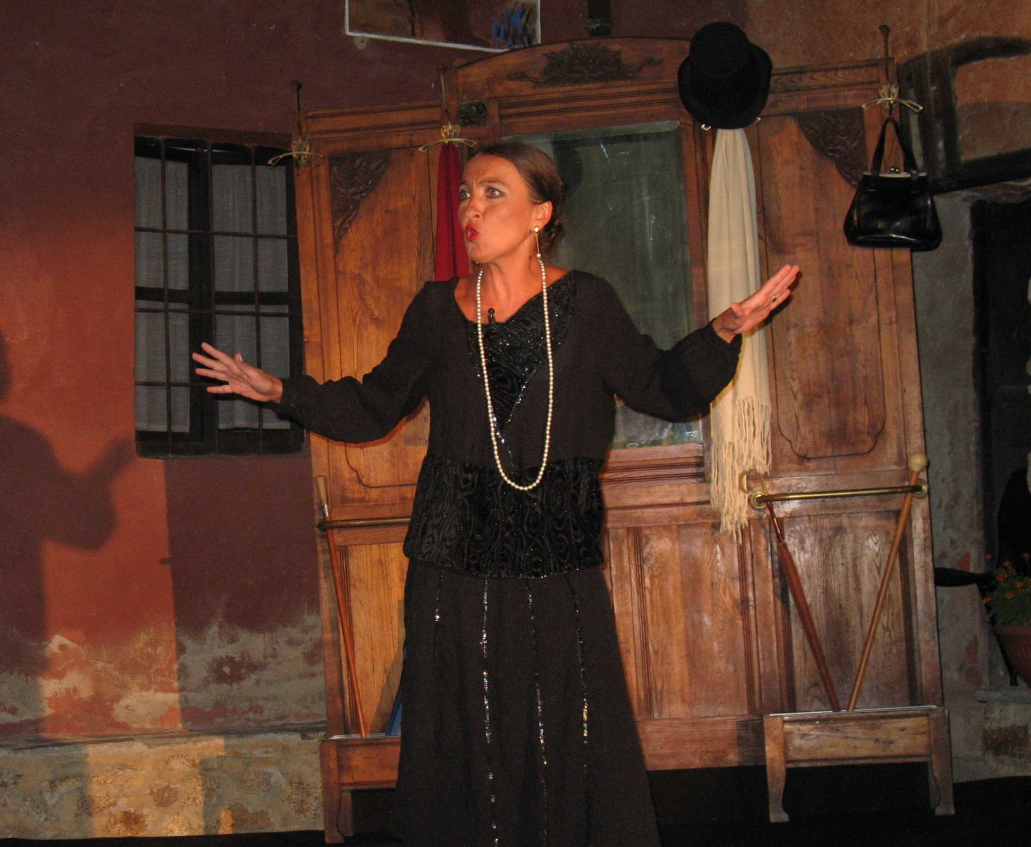 Mezzana Mortigliengo, frazione Bonda. Spettacolo: "Noi siam come le lucciole". Veronica Rocca